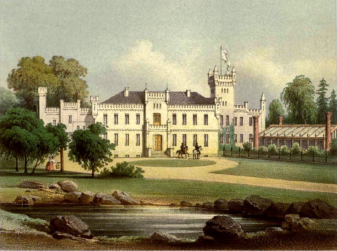 Rittergut Damerow, Kreis Prenzlau, Lithografie aus dem 19. Jahrhundert